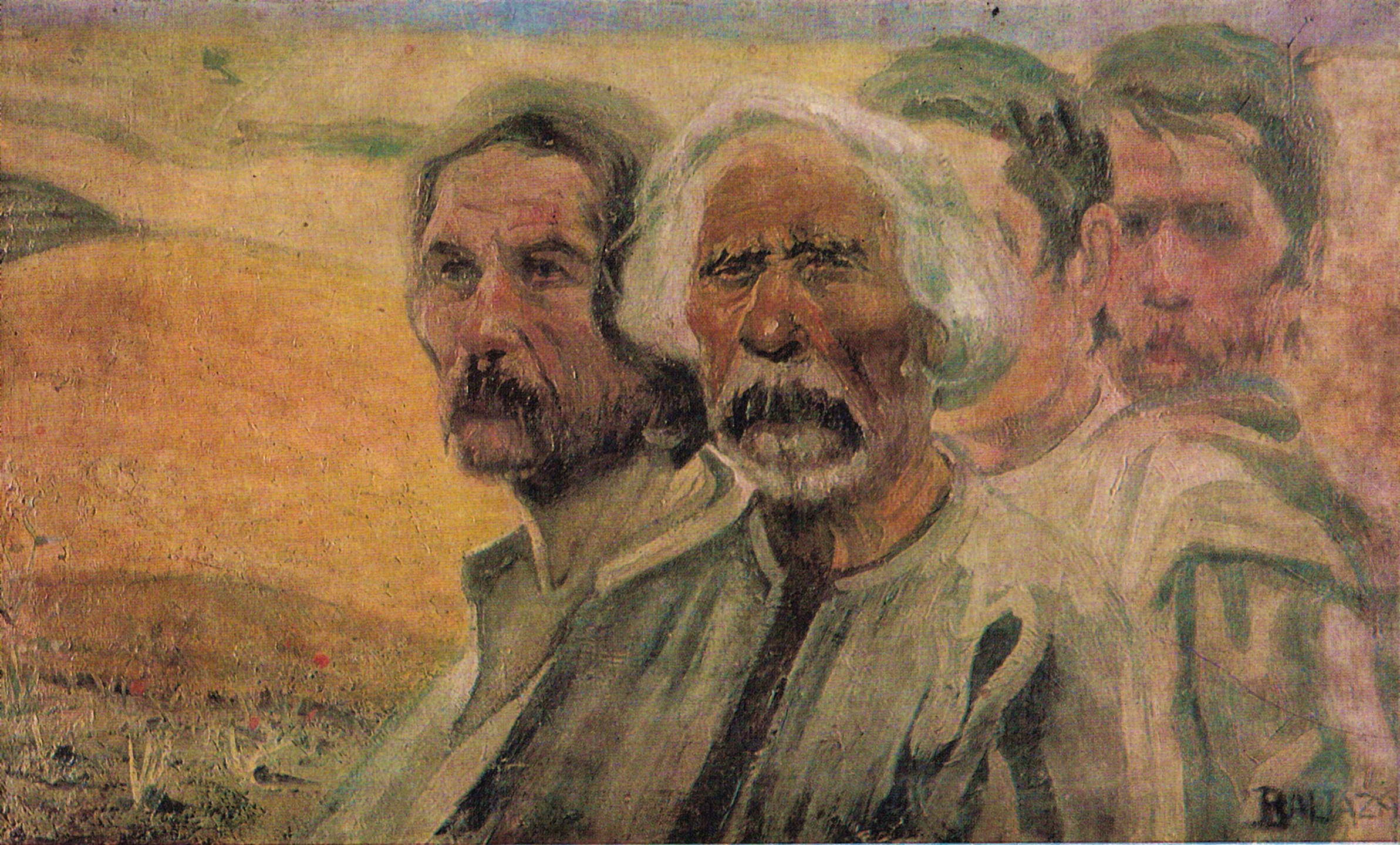 Abgar Baltazar - Ţărani